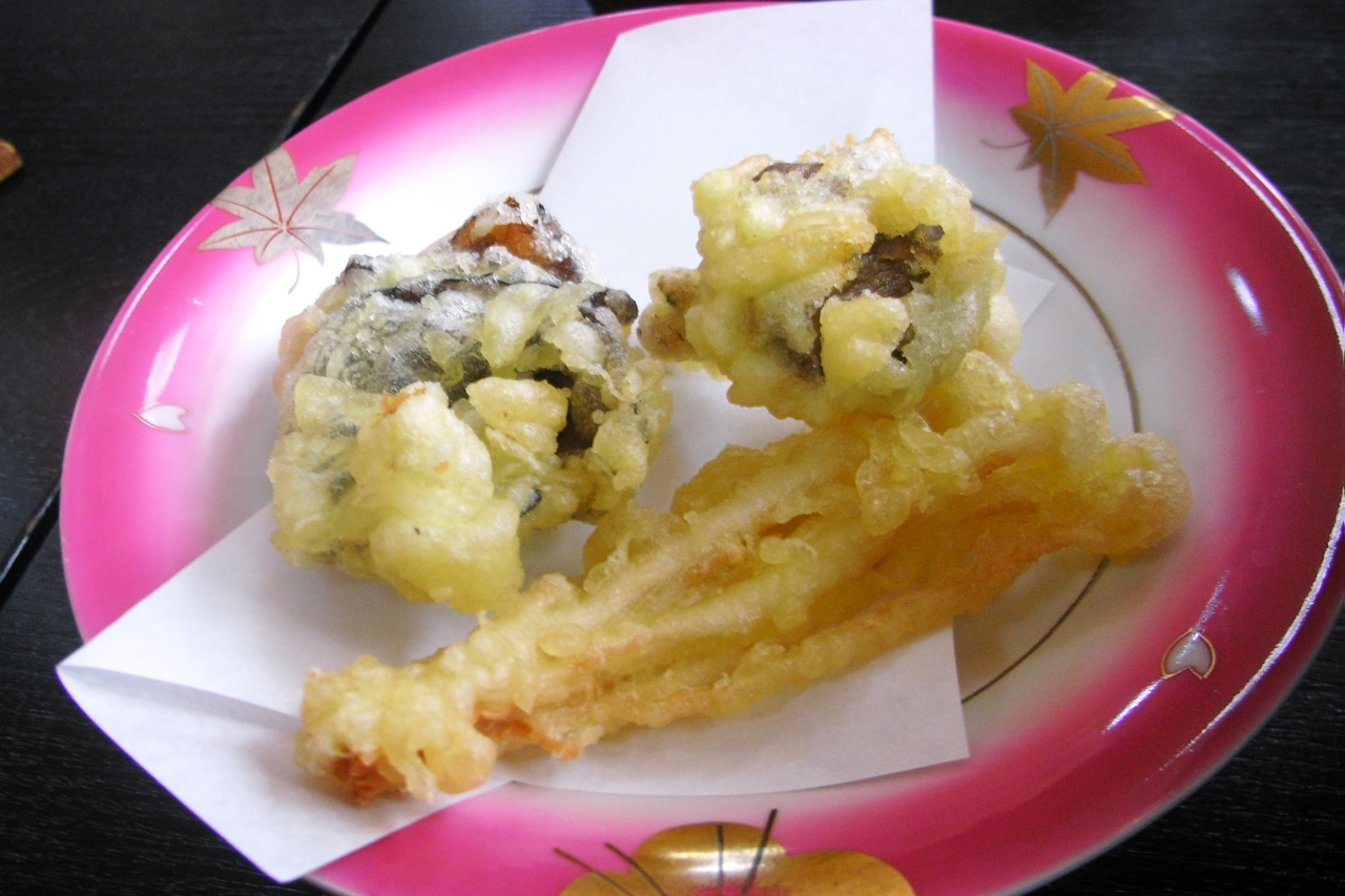 10/20にきのこを食べに長野県上田の「きのこむら深山」に行ってきました。 きのこの天ぷら。